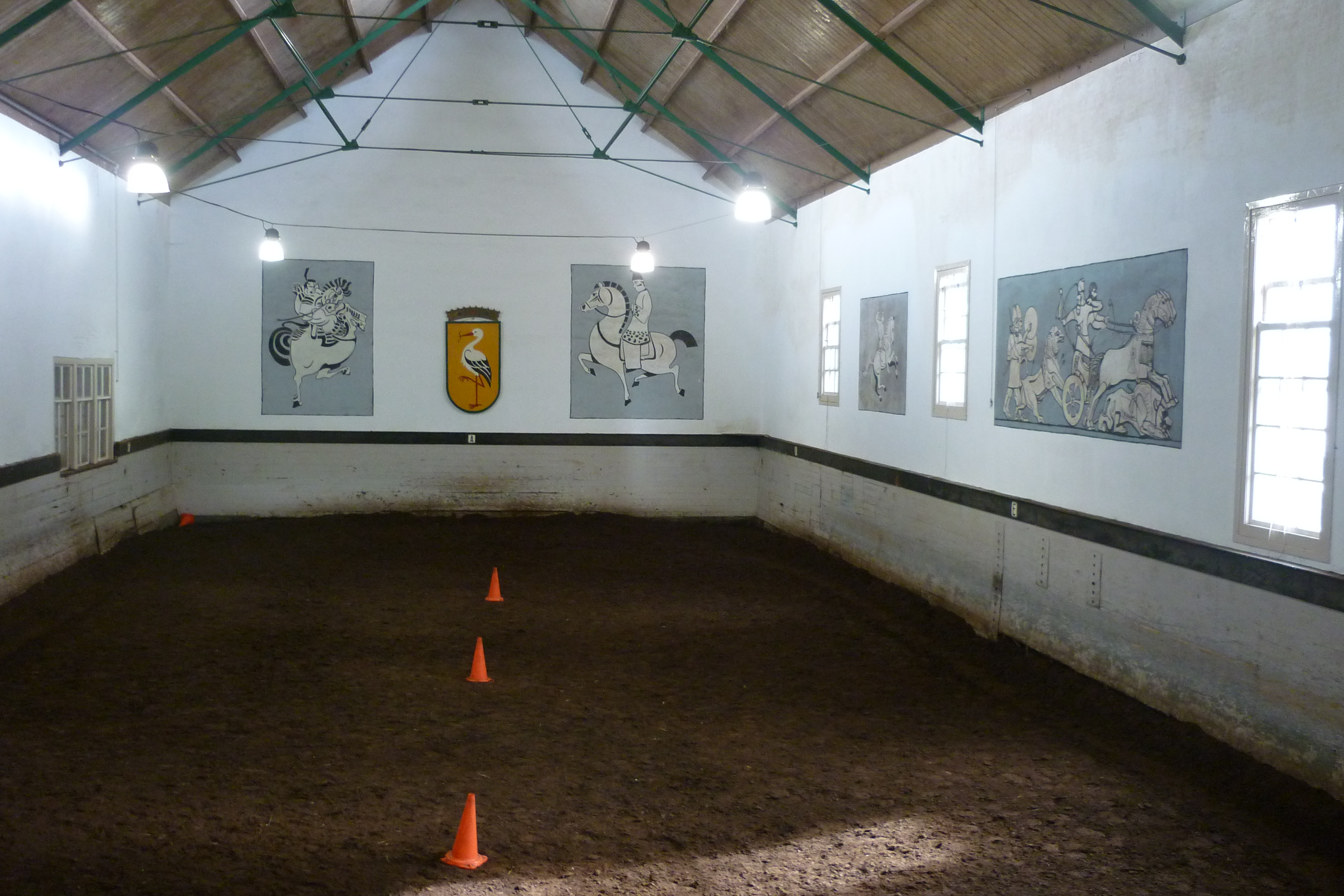 zaal van de Haagsche Stadsrijschool